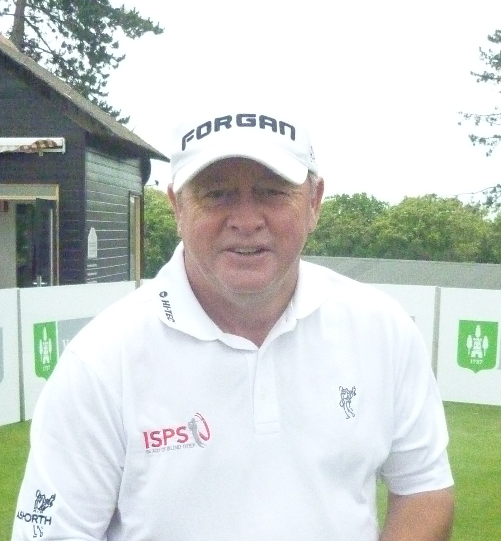 Ian Woosnam op het Van Lanschot Senior Open